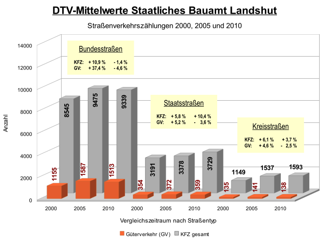 Darstellung der Verkehrsentwicklung für alle KFZ bzw. den Güterverkehr auf Bundes-, Staats- und Kreisstraße im Bereich des staatlichen Bauamtes Landshut anhand der DTV-Mittelwerte aus den Verkehrszählungen 2000, 2005 und 2010